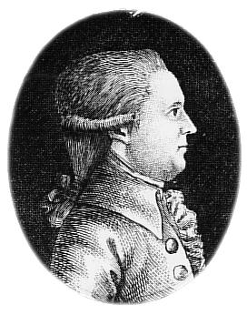 Karl von Marinelli, Stich